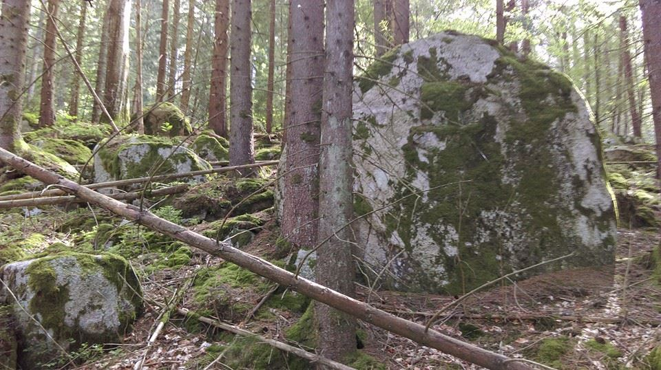 Erratische Blöcke am Schluchsee